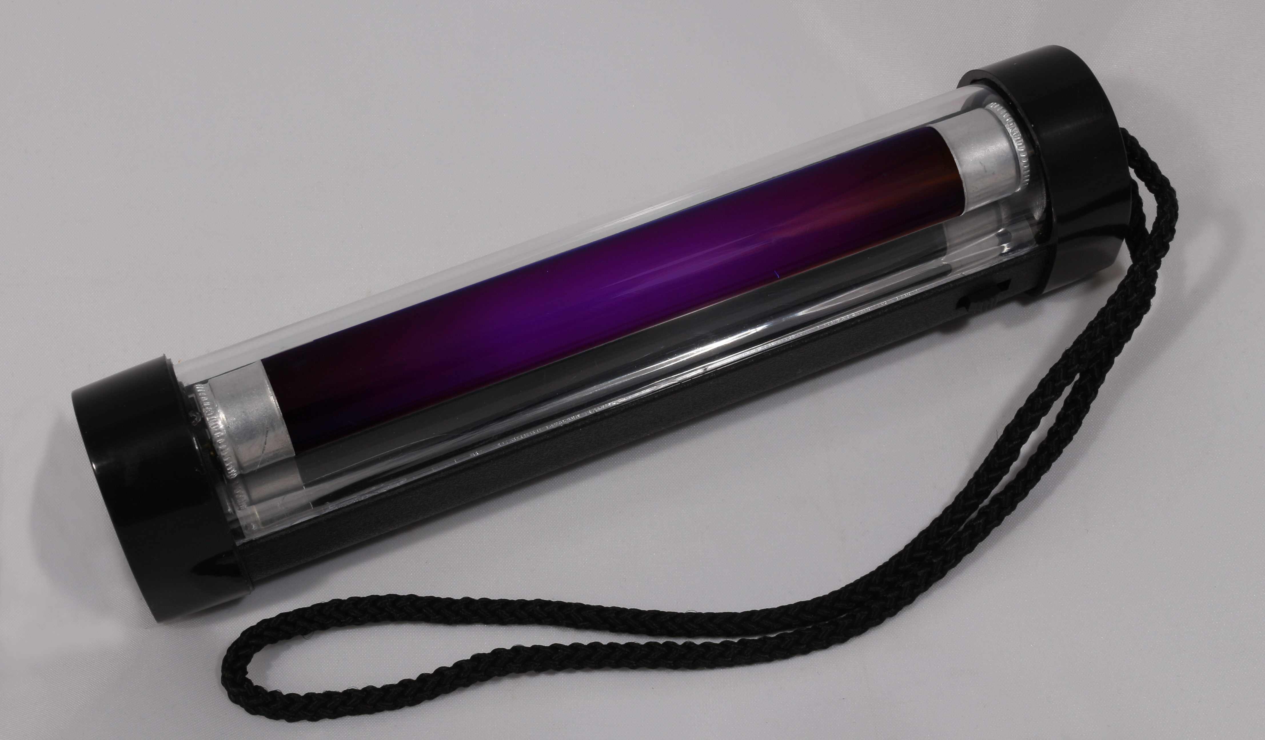 UV-Lampe, speziell zum Prüfen von Briefmarken auf deren UV-Reflexion zum Bestimmen der Echtheit